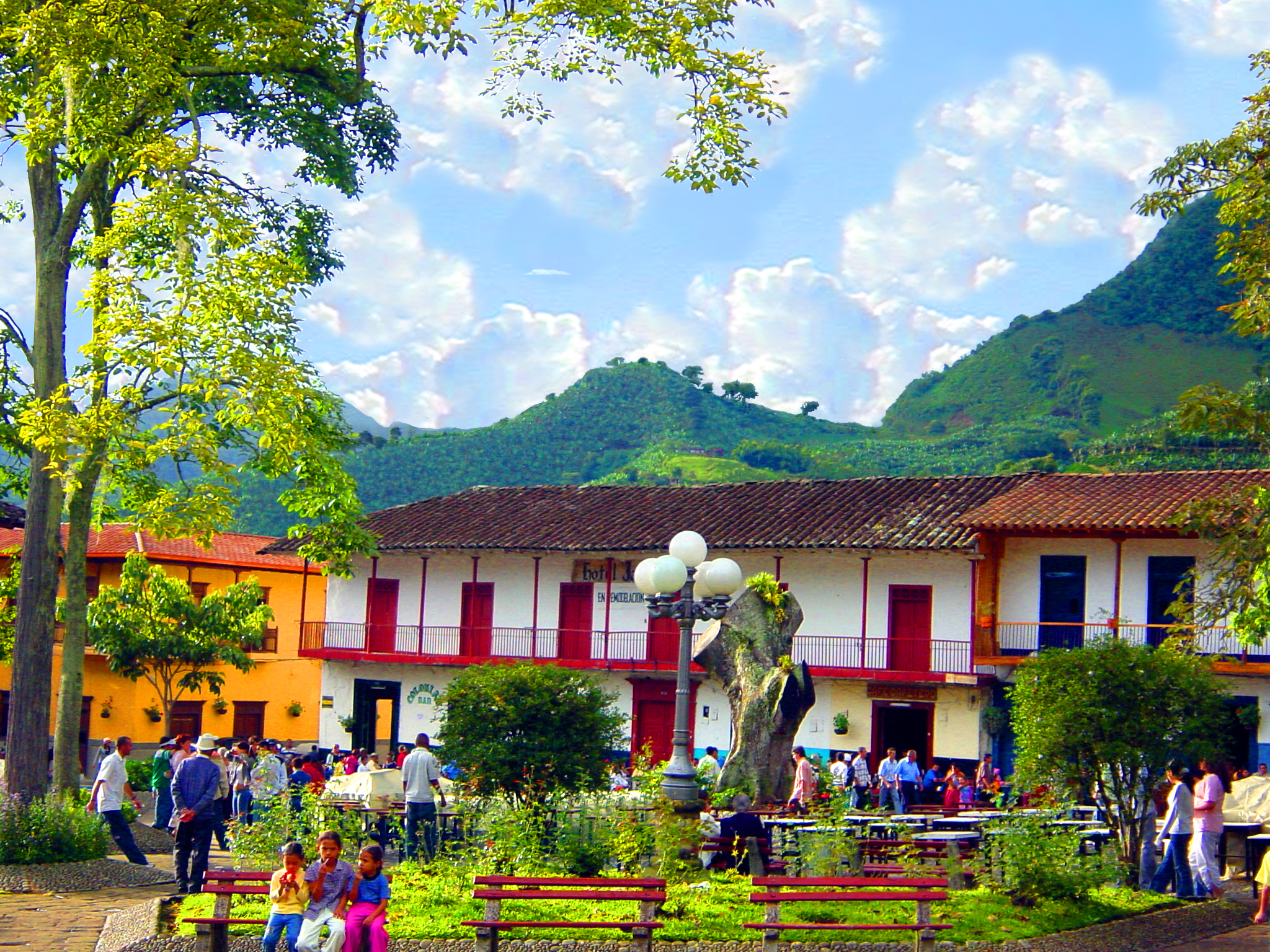 Urbanismo paisa original en perfecto estado de conservación, Suroeste Picture by uploader taken on November 2006